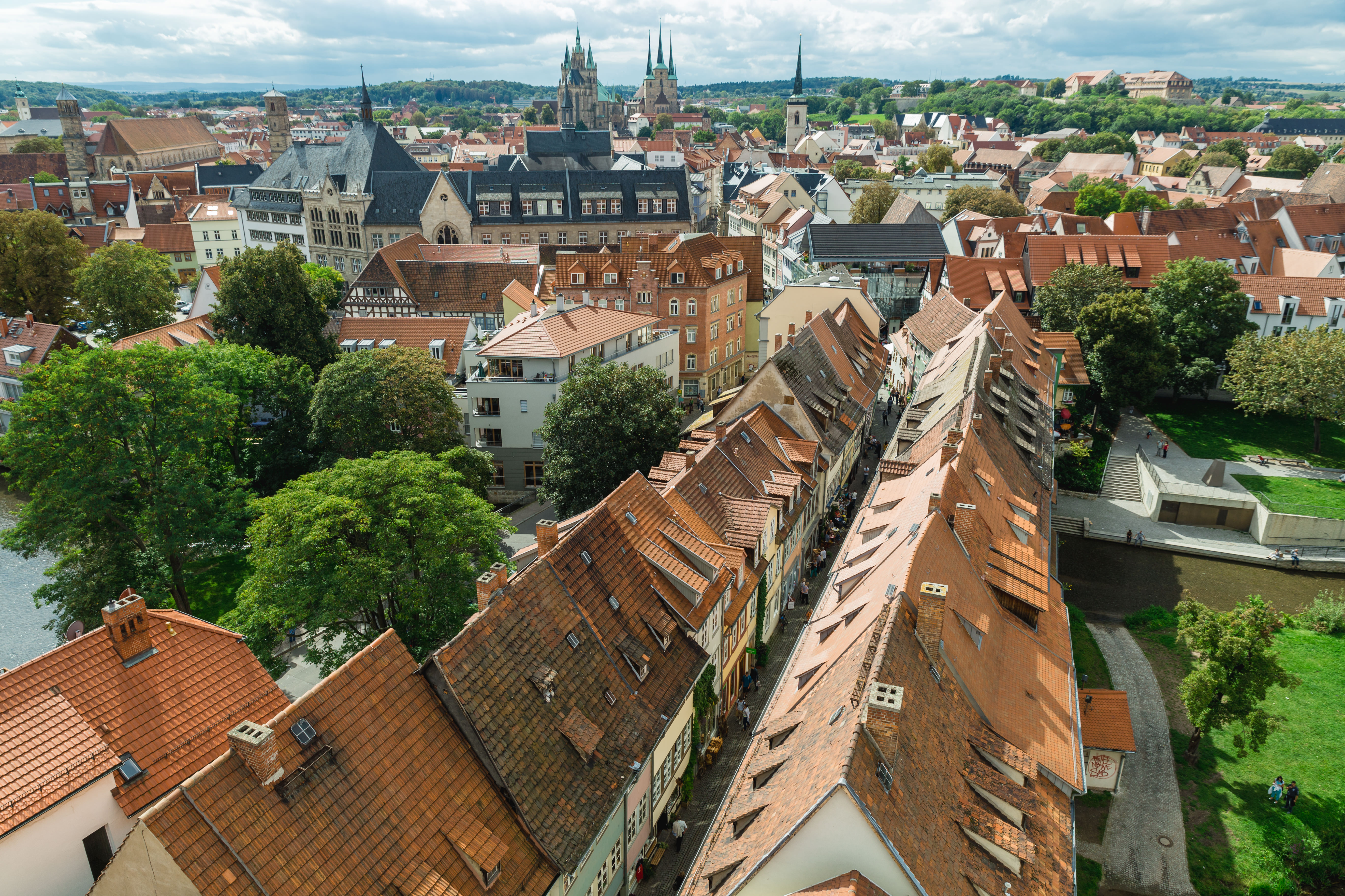 Krämerbrücke, Erfurt